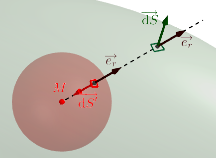 Illustration pour la démonstration du théorème intégral de Kirchhoff.